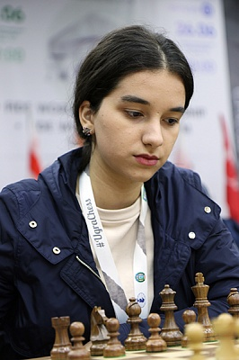 Гунай Маммадзада, фото Этери Кублашвили с командного чемпионата мира в Ханты-Мансийске